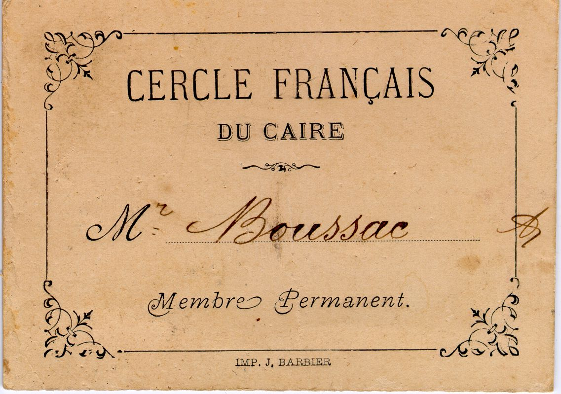 Carte de membre d'H. Boussac du Cercle français du Caire, Musée des Beaux-Arts de Béziers